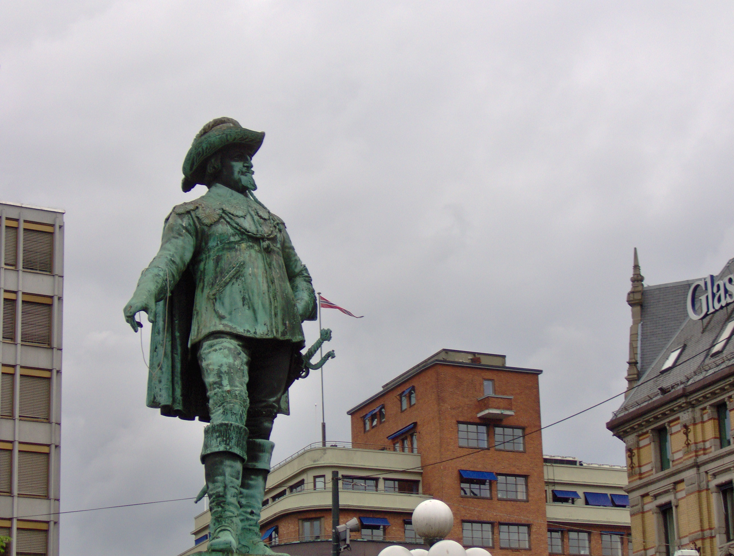 Fjerde Christian har naturligvis en statue i "Christiania"